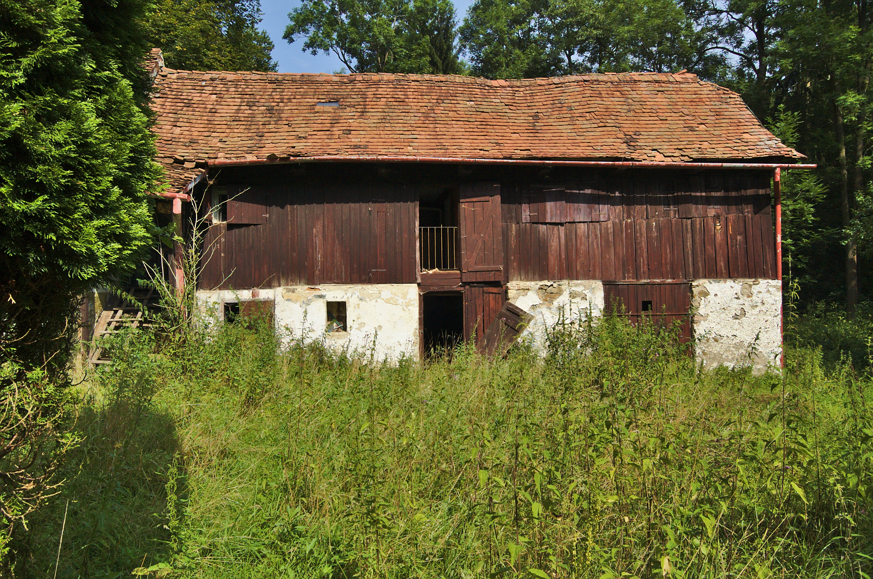 Samota Pilka - bývalá vodní pila, Šebetov, okres Blansko